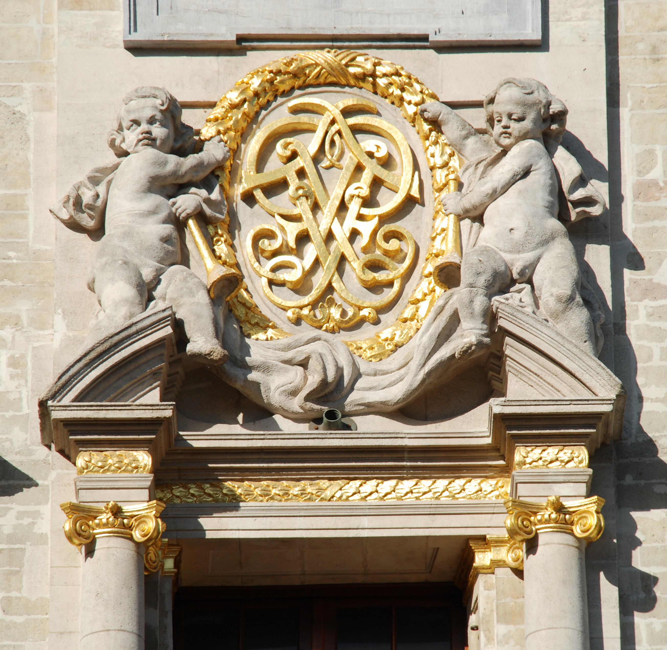 Belgique - Bruxelles - Grand-Place - Maison du Cygne